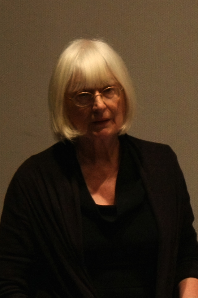 Béatrice Picon-Vallin, chercheuse au CNRS, lors d'une conférence à l'INSAS.